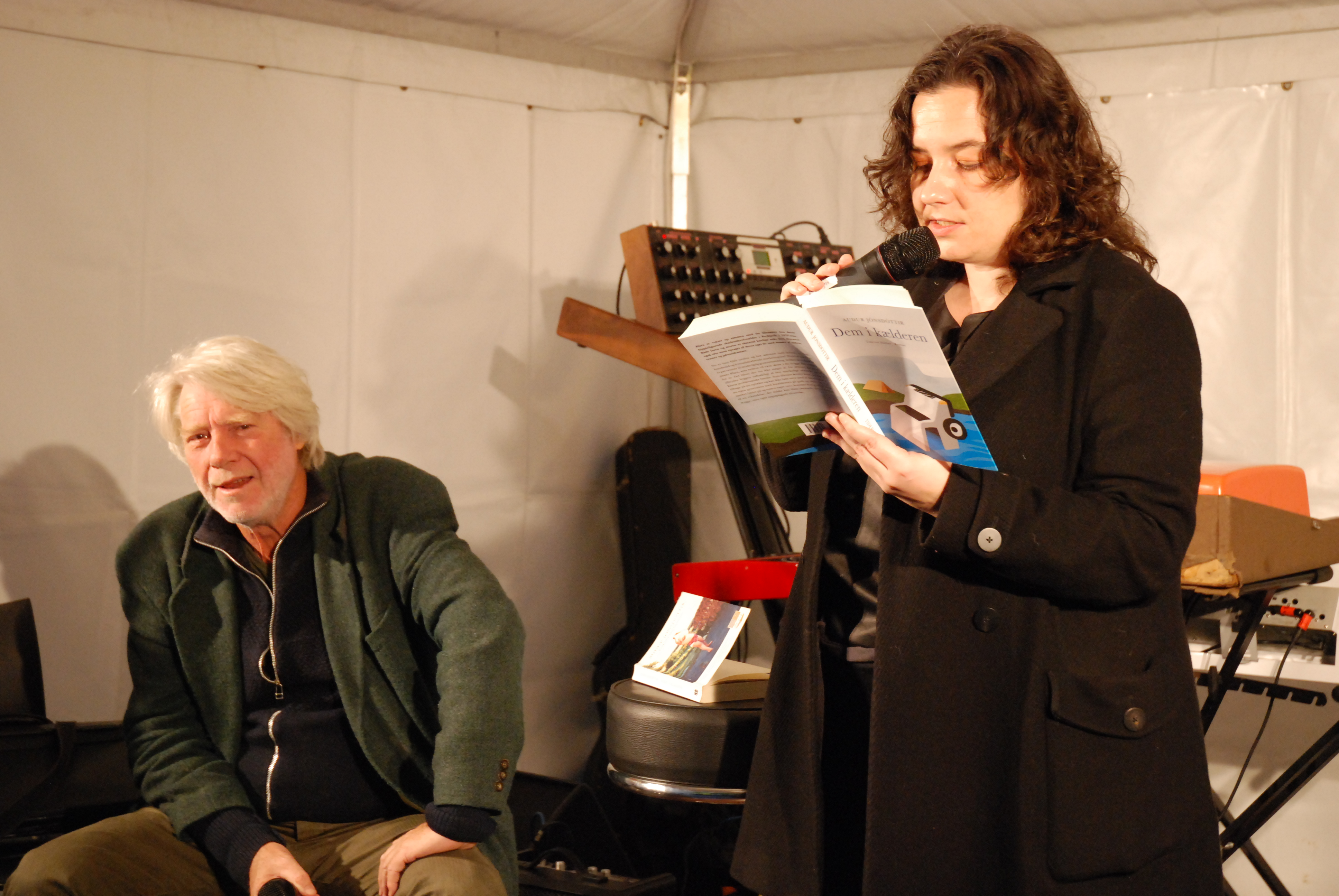 Den islandske forfatteren Auður Jónsdóttir leser fra "Dem i kælderen" under kulturnatt i Nordisk råd og Nordisk ministerråd oktober 2009.